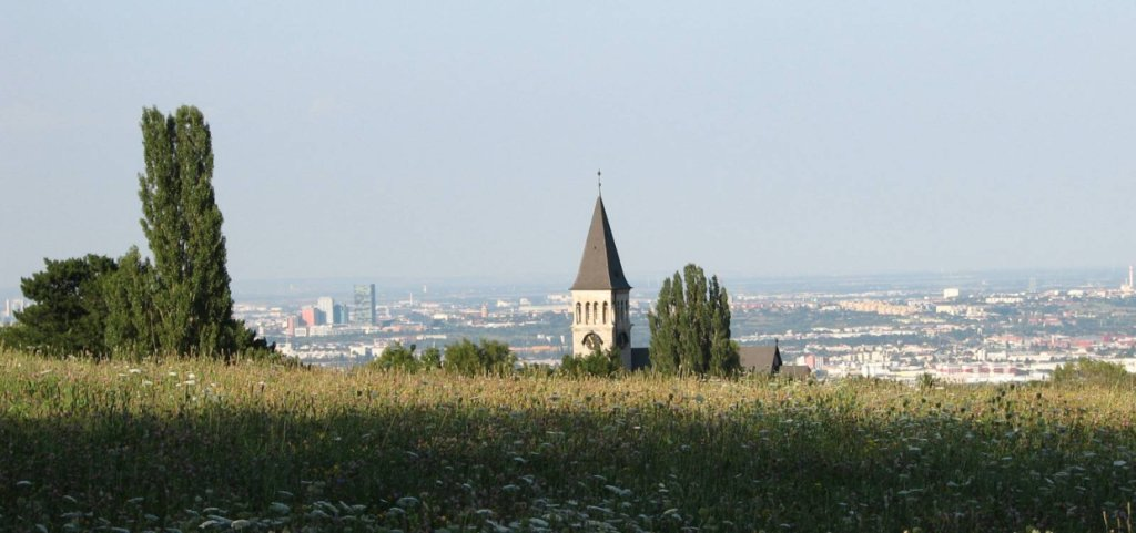 Gießhübl bei Wien mit Blick auf Wien